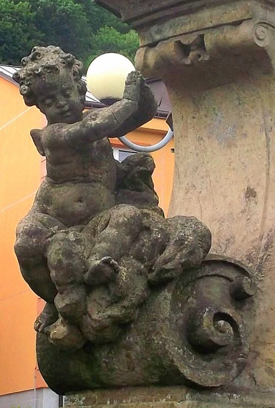 Sloup se sousoším - Mariánský sloup Žacléř, Rýchorské nám.